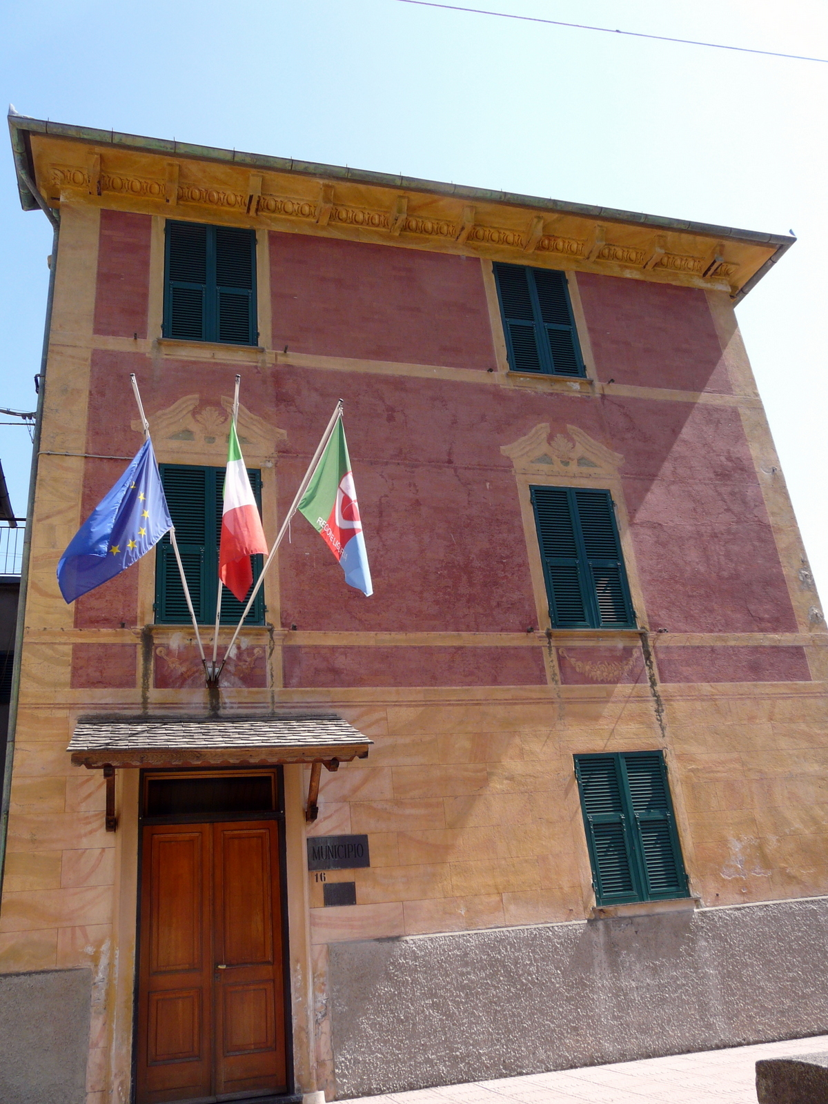 Municipio di Neirone, Liguria, Italia